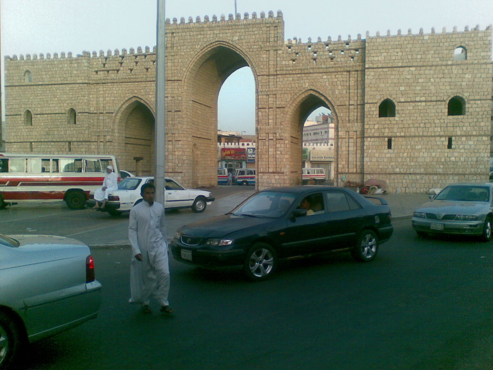 ജിദ്ദ മക്ക ഗേറ്റ്,ഇതിനു ചുറ്റും ആണ് ടൌൺ ബസ്‌ നിലയം